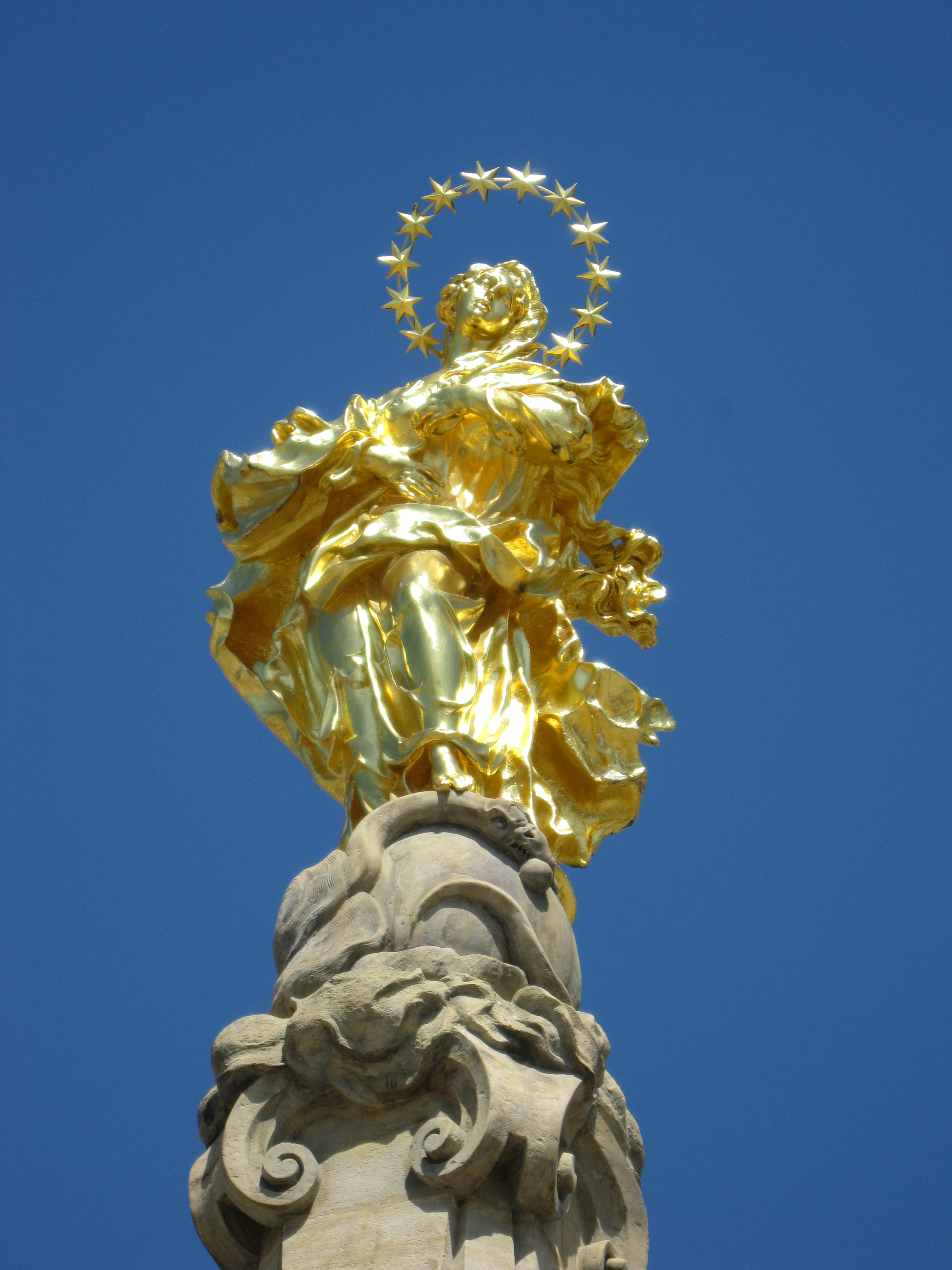 Sloup se sousoším - Mariánský sloup (Šternberk)